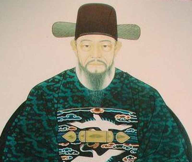 충의공 엄흥도 영정